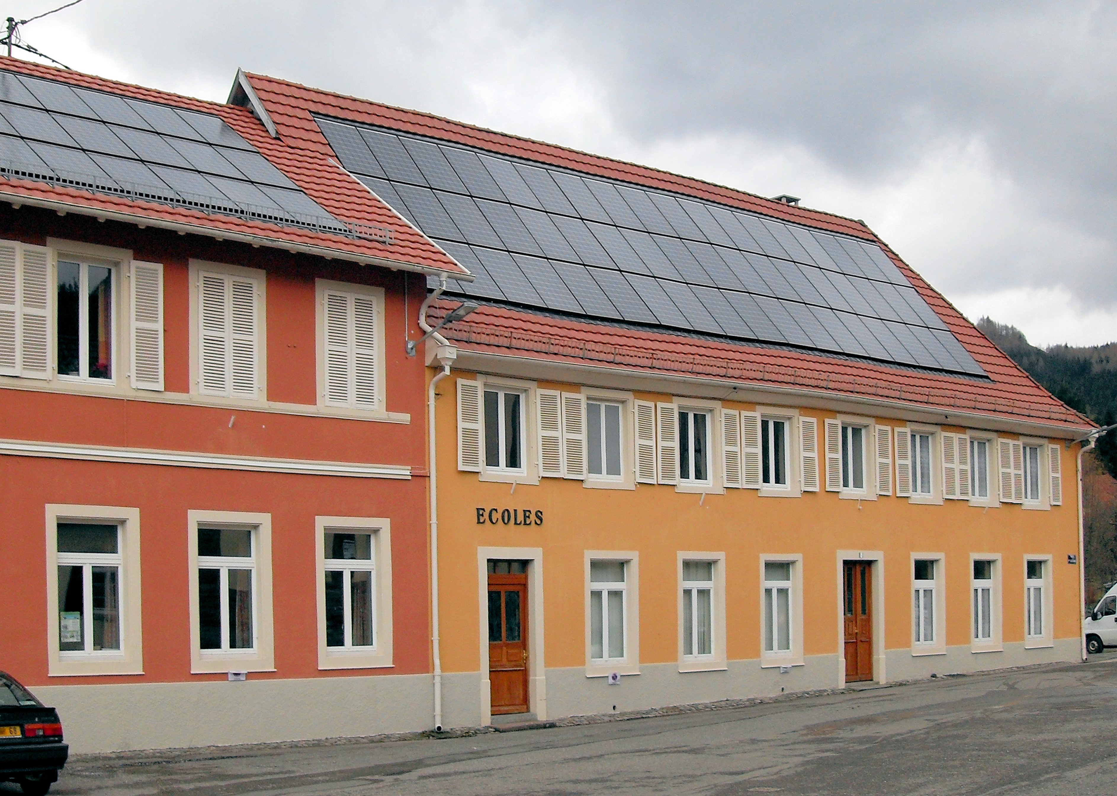 Le bâtiment de l'écoles de Mollau Mollau